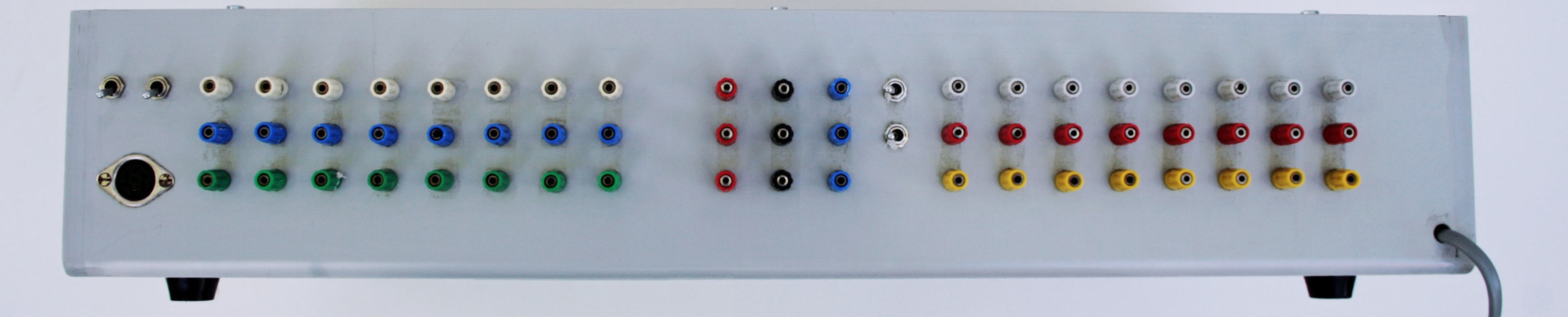 2mm Anschlussbuchsen für 16 Digital-Eingänge und 16 Digitalausgänge auf der Rückseite des EZ80-DIT Prototyp Mikrocomputers